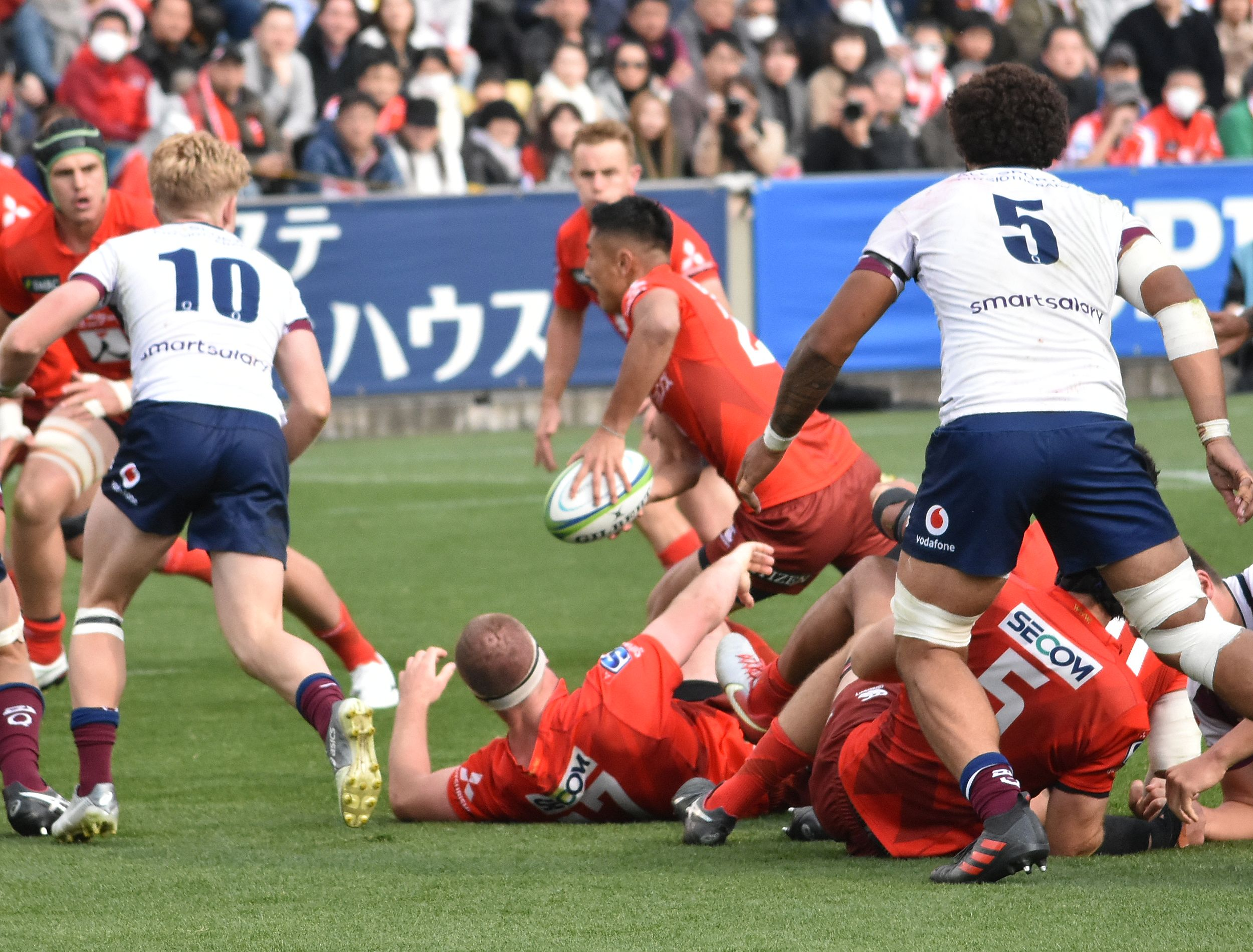 内田 啓介。秩父宮ラグビー場にて。 Nikon D3400